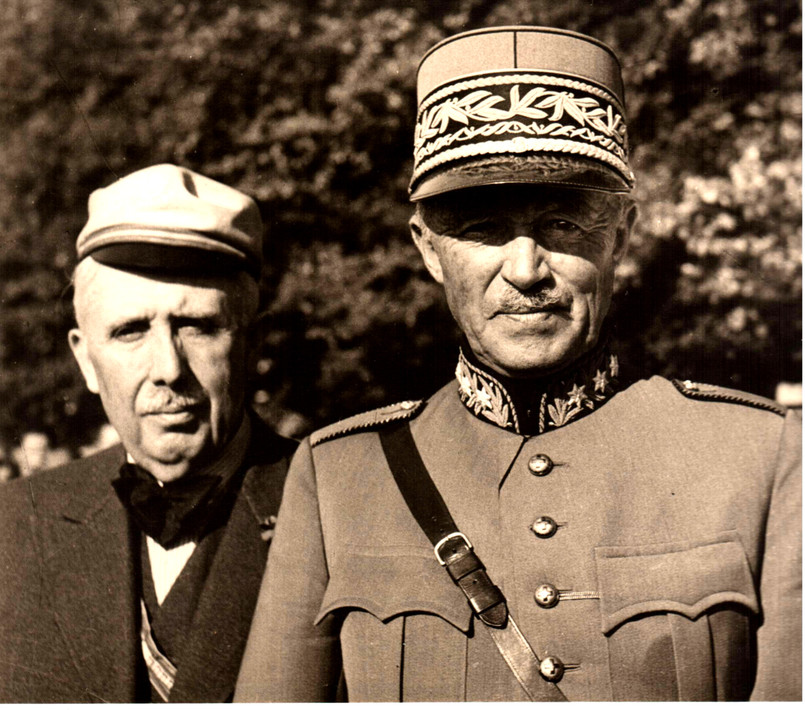 Photo du général Henri Guisan et du conseiller fédéral Eduard von Steiger à la Fête centrale de Zofingue de 1945